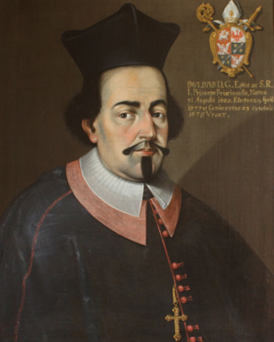 Paulinus Mayr, Fürtsbischof von Brixen